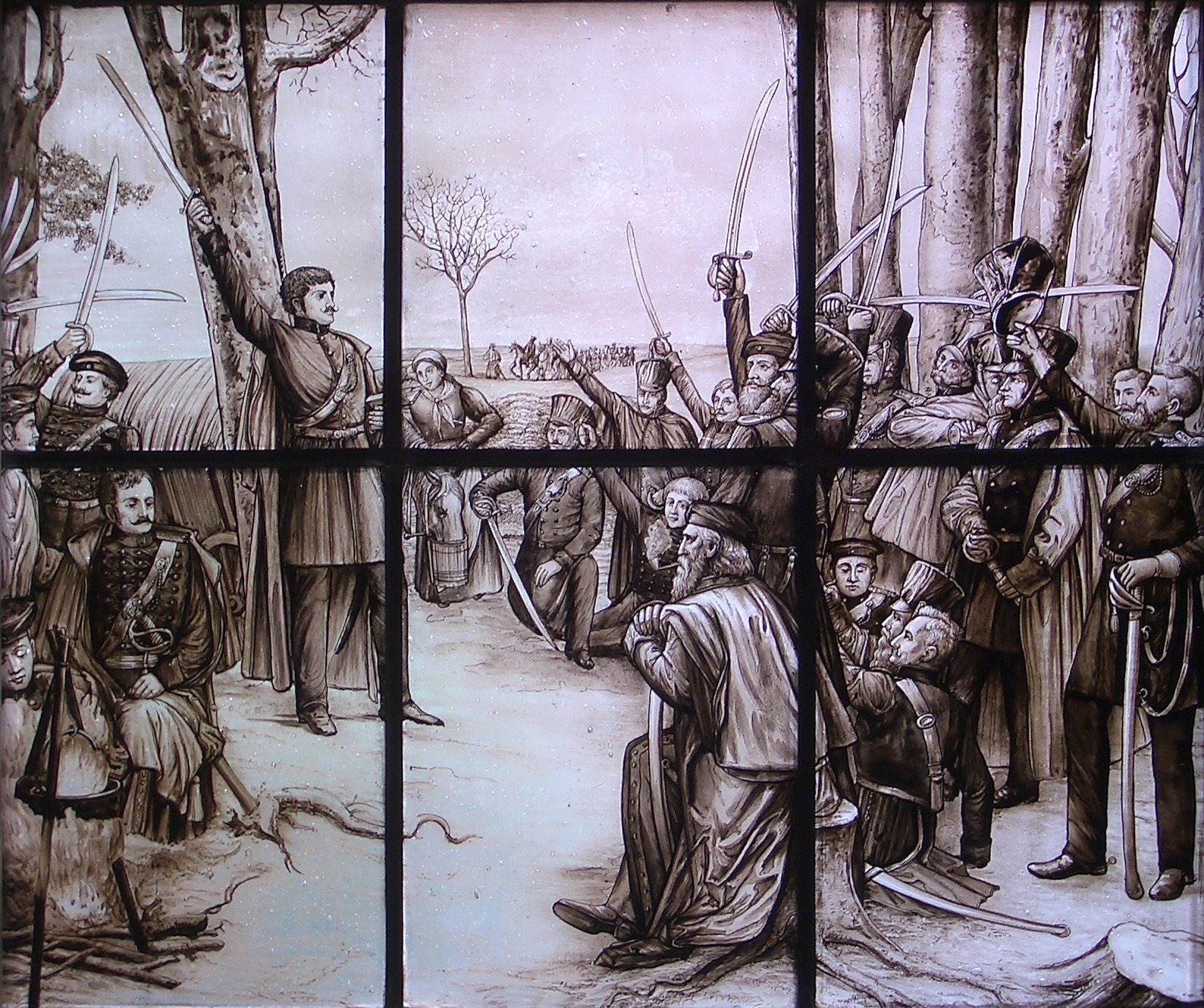 Theodor Körner, am 26. August 1813, eine Stunde vor einem Angriff auf einen französischen Tross, im Lager bei Gadebusch seinen Kameraden die von ihm gedichteten „Kriegslieder“ vortragend.